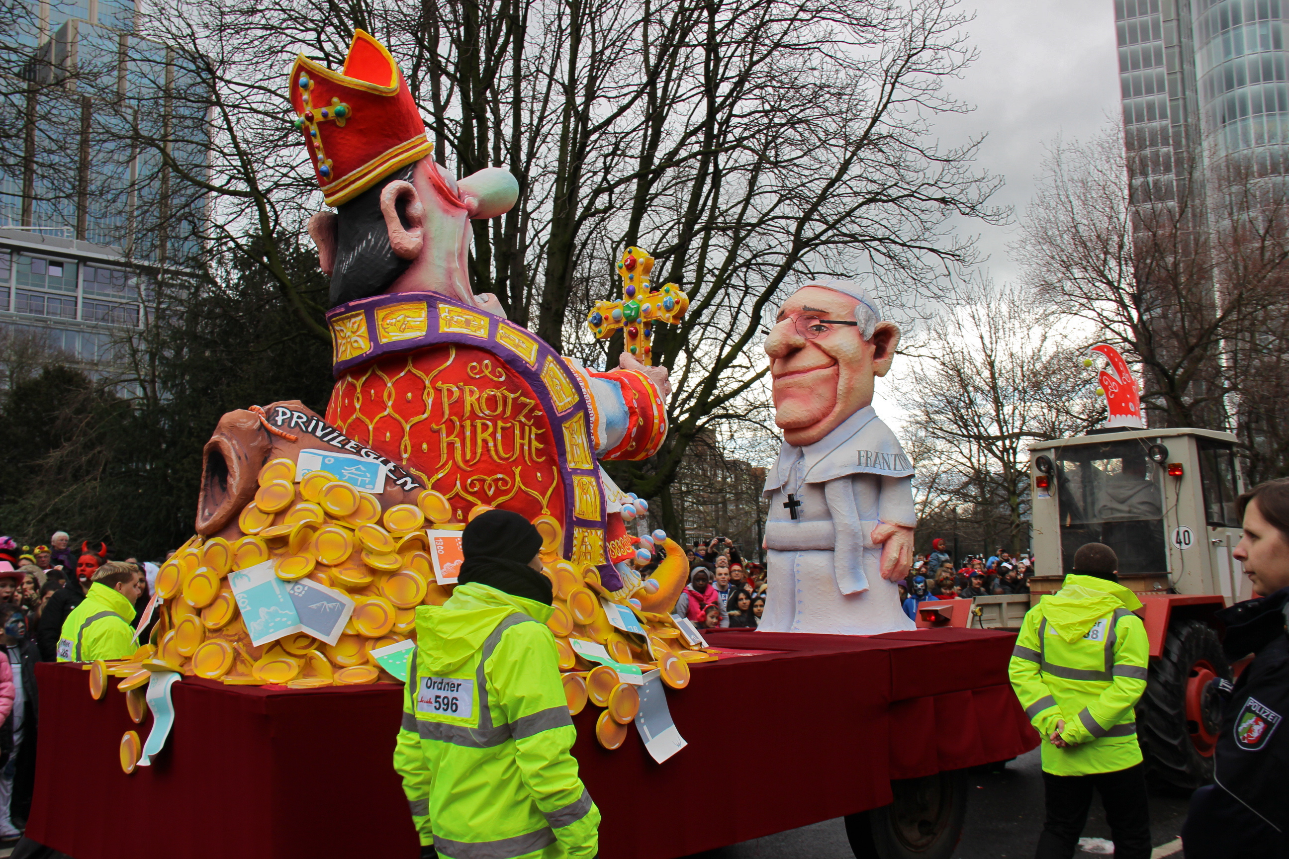 Düsseldorf Karneval 2014